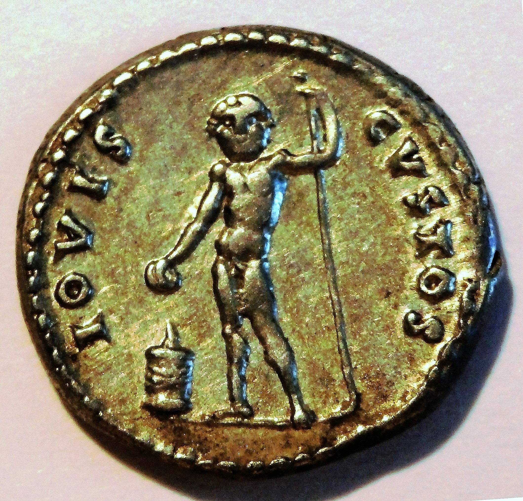 nackter Jupiter opfert an kleinem Feueraltar, Rückseite eines Denar des Titus, Kampmann 22.28